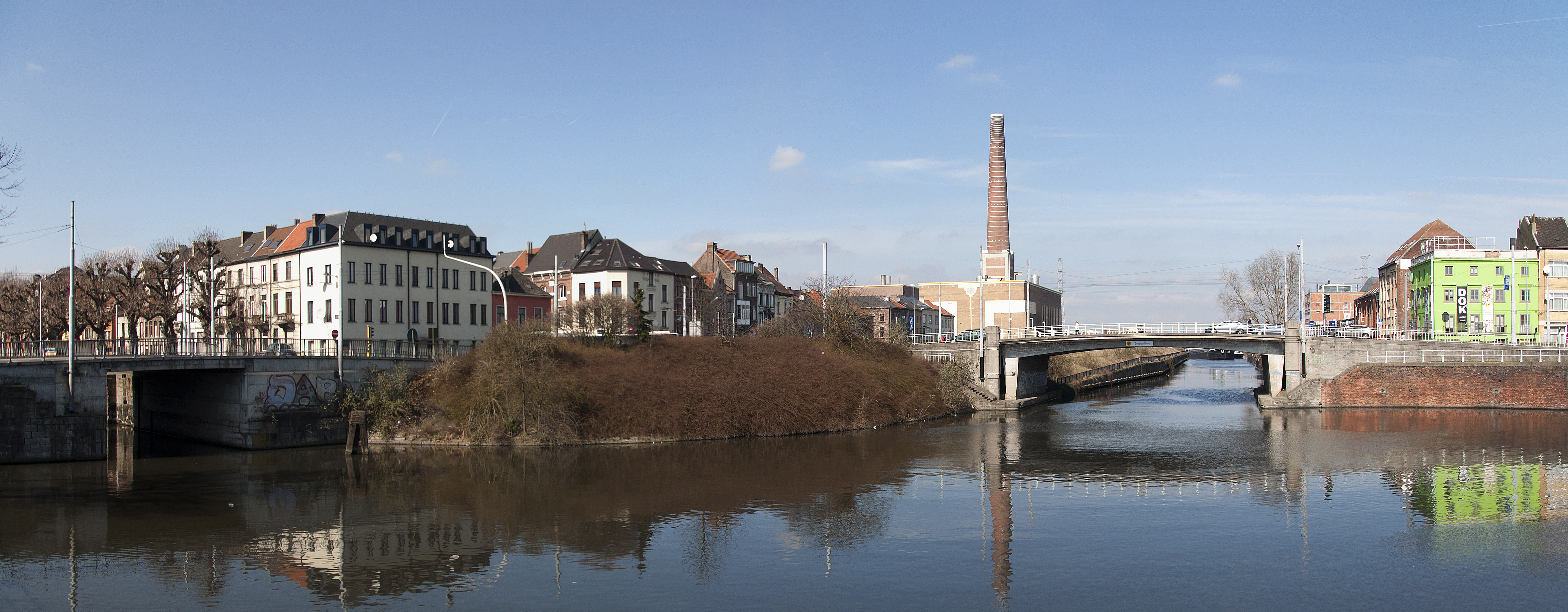 De zwaaikom tussen de Napoleon dePauwvertakking en het Achterdok van de haven van Gent met links de Oktrooibrug en de Dampoortbrug